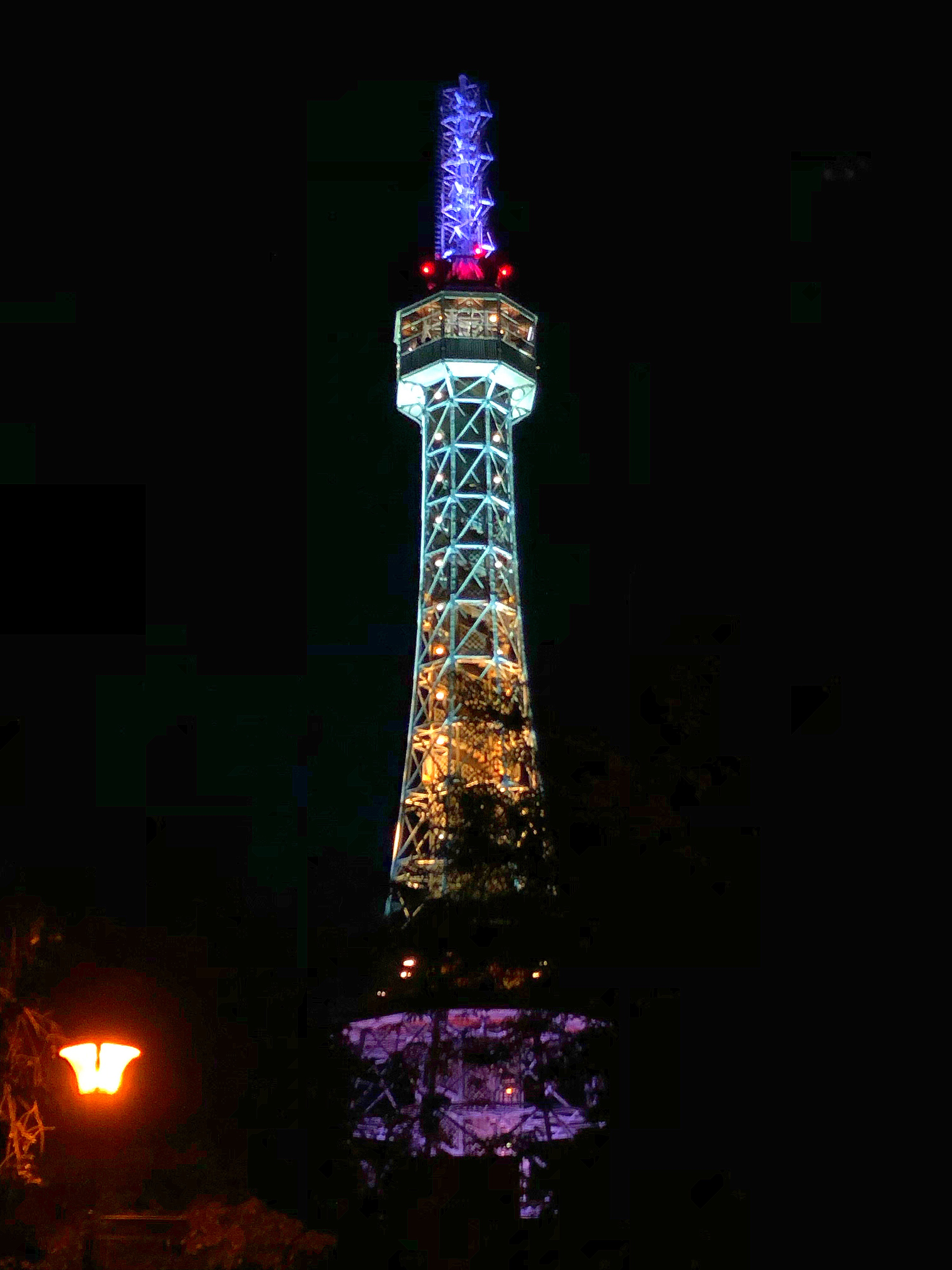 Petřínské sady, Praag, Tsjechië, August 2019